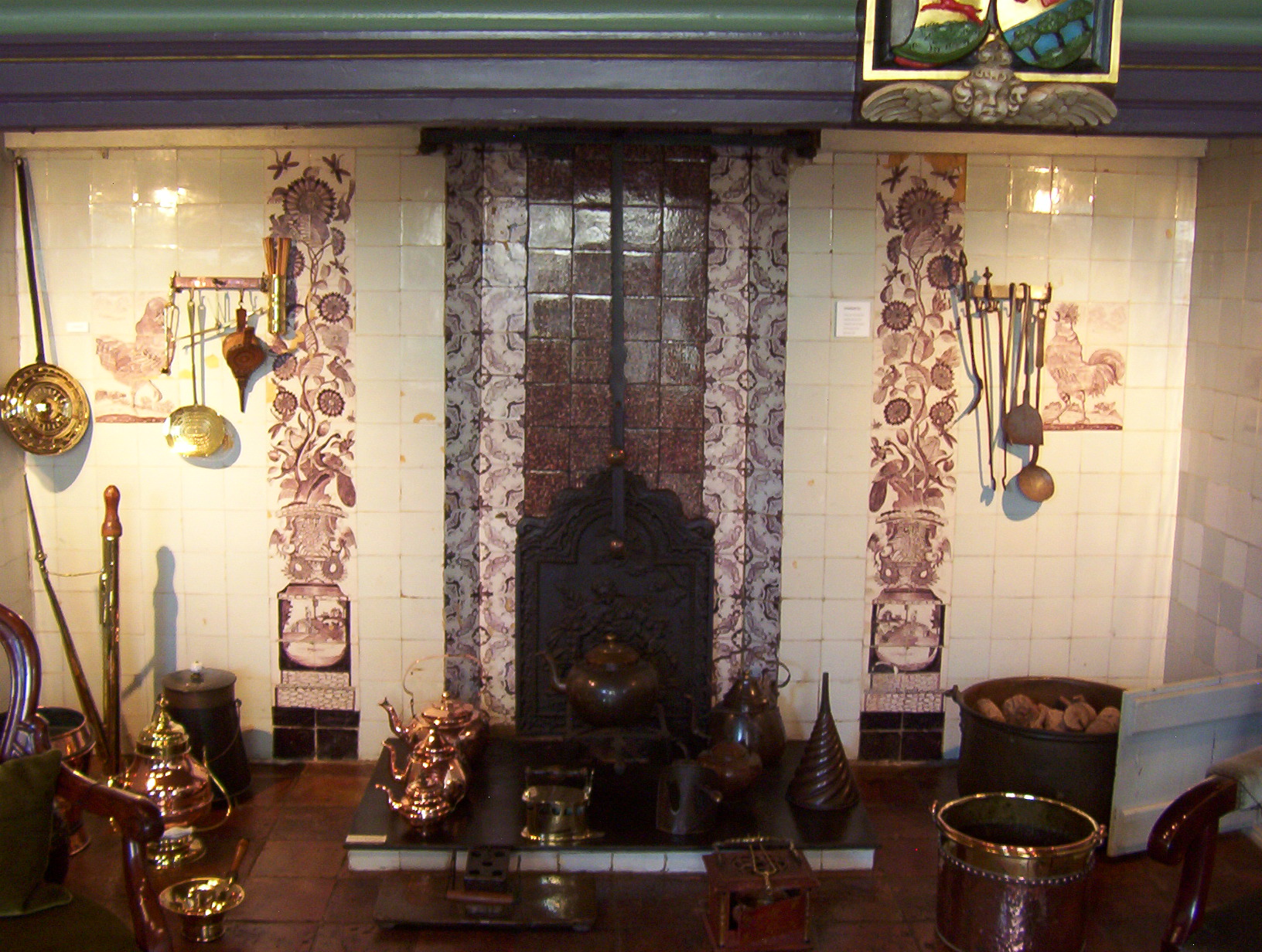 Schouw in de "mooie kamer" in museum De Koperen Knop. Eigen foto, augustus 2005